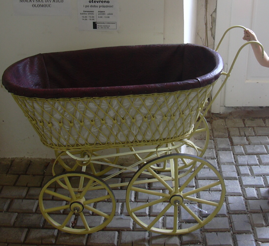 historický kočárek (Náměšť na Hané- czech republic)